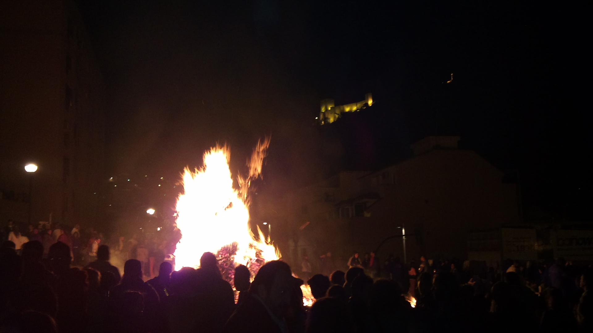 Vista de la lumbre de San Antón en el barrio de La Gloria, al fondo se observa el Castillo de Santa Catalina y la Cruz.